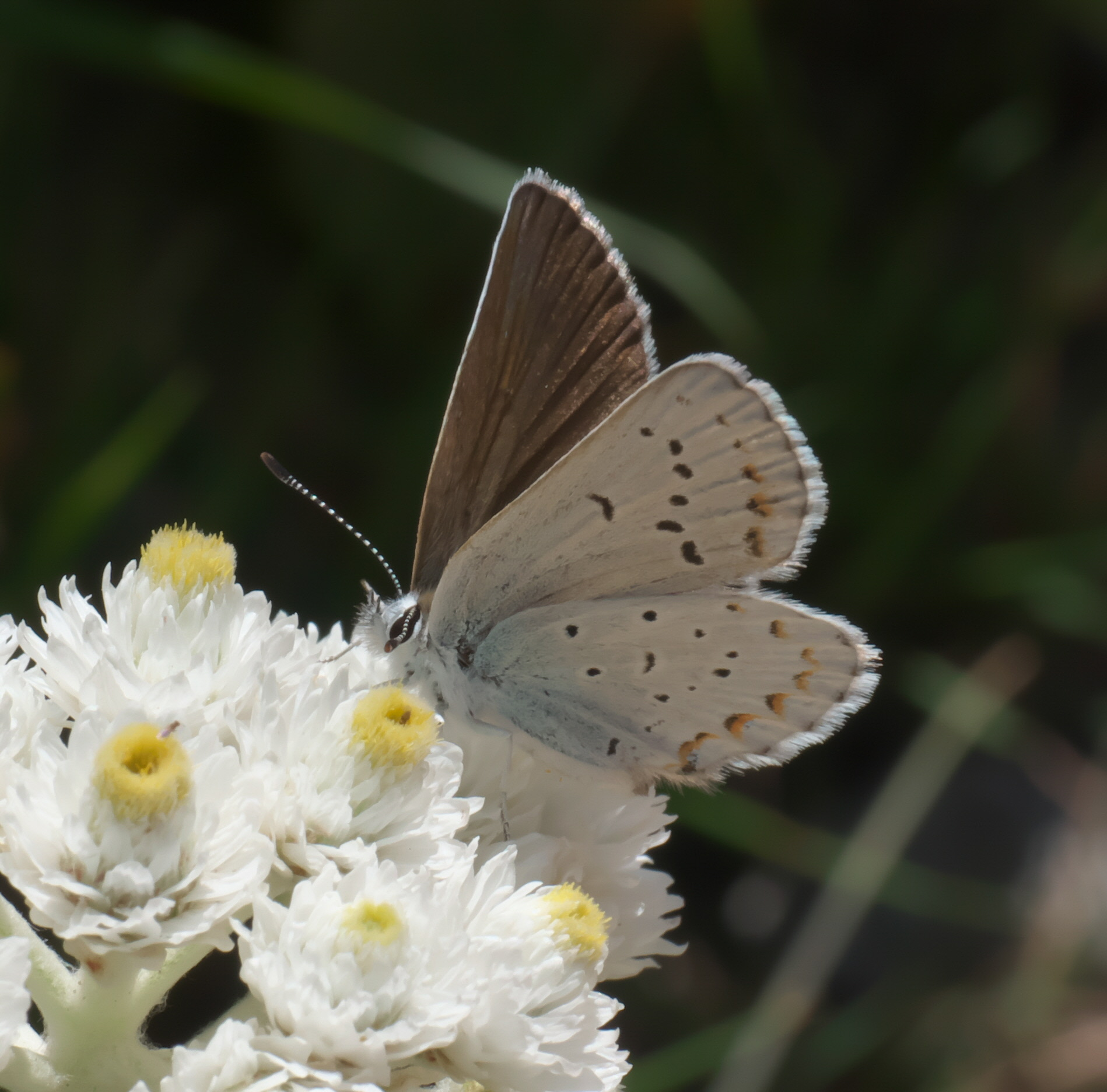 Plebejus anna, Anna's Blue - Hodges #4374.1, ID Confidence: 98